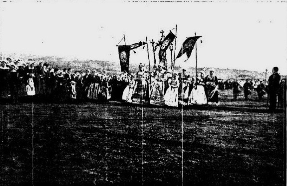 Procession du pardon de Sainte-Anne-la-Palud dans le département français du Finistère en 1903.